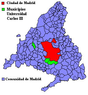 Map of the municipalities where Universidad Carlos III has its campuses. Mapa de los municipios en los que la Universidad Carlos III tiene campus.